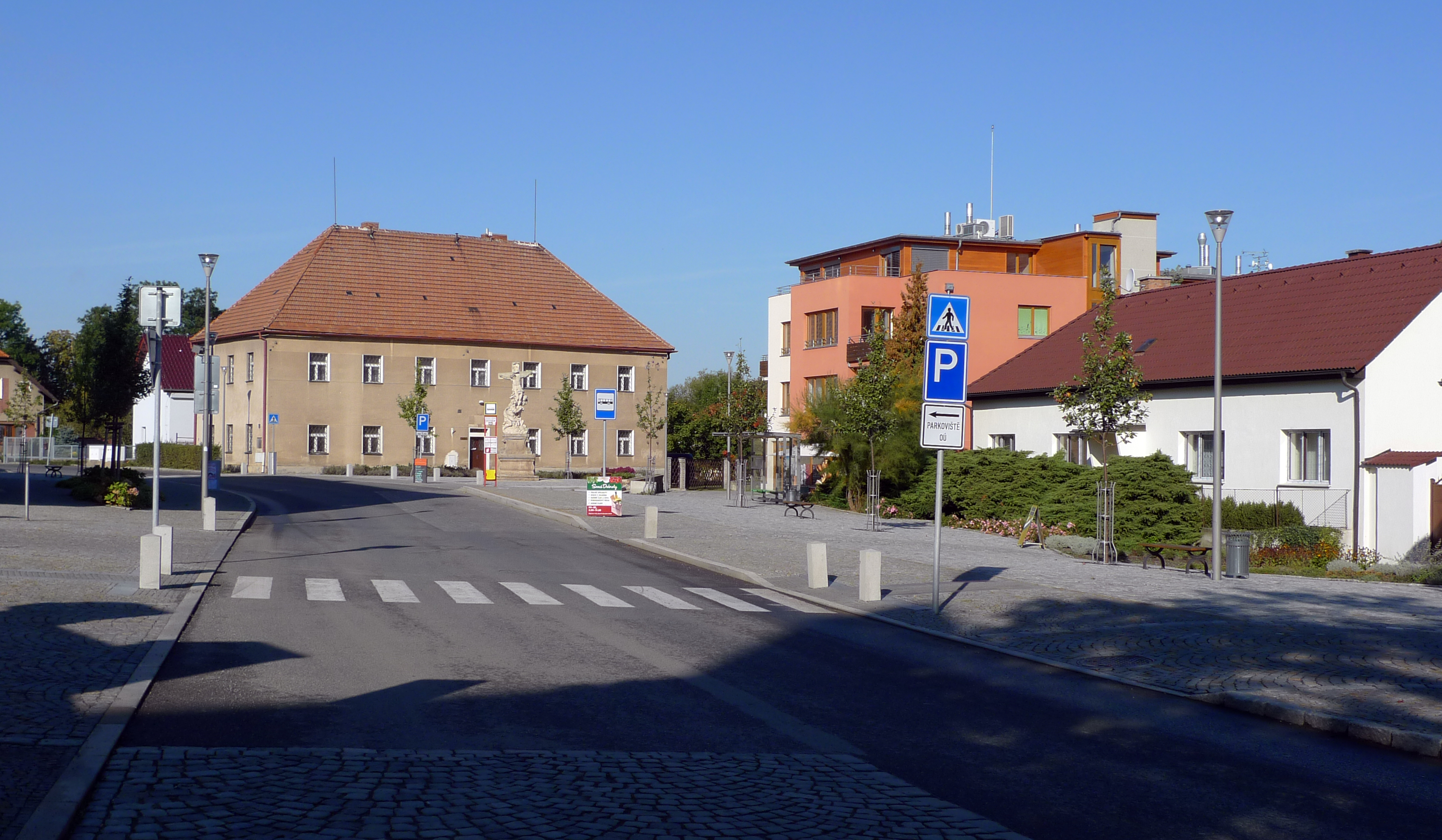 Centrum Dolních Břežan u Prahy